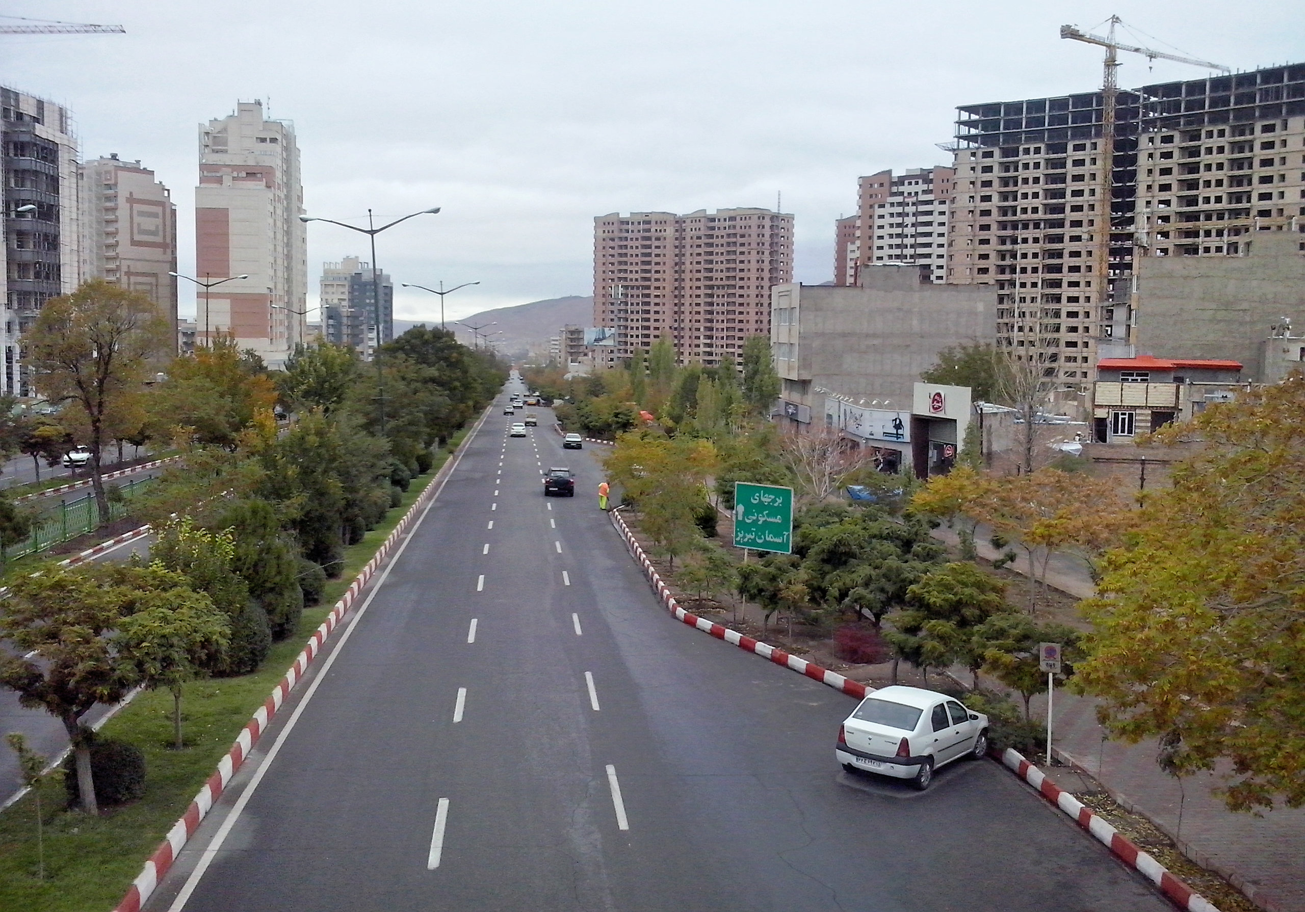 بلوار شهید باکری تبریز. بلوار ایلگلی.